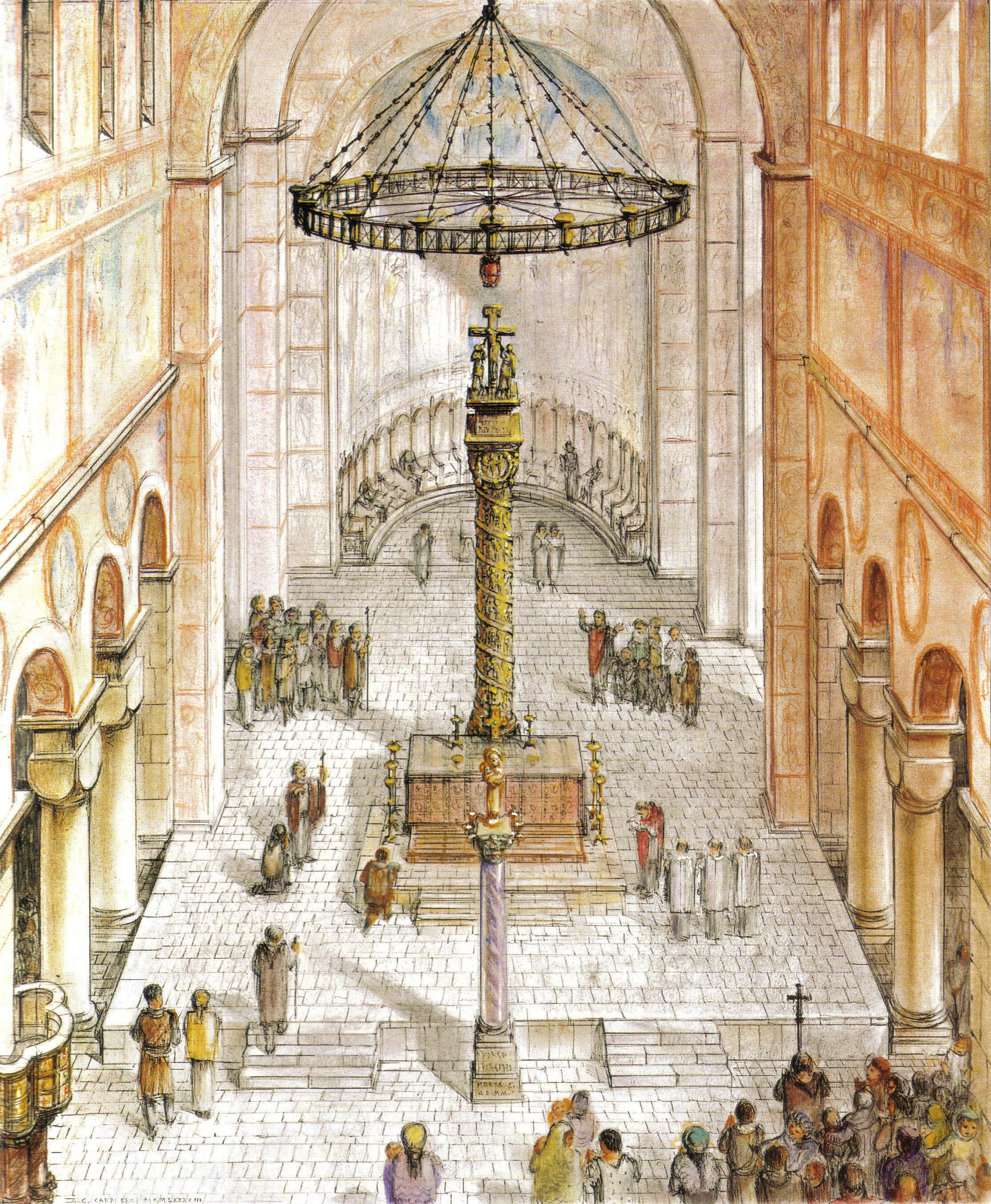 Die Christussäule in St. Michael (bis 1810). Rekonstruktion Carpiceci/Gallistl. Aus B.Gallistl, Die Bernwardsäule und die Michaeliskirche zu Hildesheim, Olms Verlag 1993.